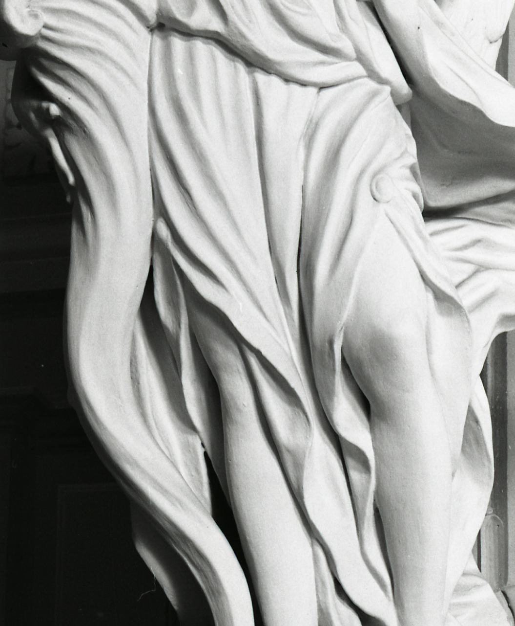 Servizio fotografico : Bologna, 1975 / Paolo Monti. - Strisce: 3, Fotogrammi complessivi: 26 : Negativo b/n, gelatina bromuro d'argento/ pellicola ; 35 mm. - ((Sul portanegativi: N[I]K[MA]T FP4 e iscrizione documentaria e didascalica manoscritta a penna nera "[...] 7-22 Bo - Chiesa delle Muratelle". - All'interno del portanegativi: la serie è anche identificata da due linee orizzontali a pennarello nero che delimitano la suddetta serie, separandola dalla precedente e dalla successiva di soggetti diversi. - Occasione: Pubblicazione. - Fonte: Agenda di Paolo Monti: Leica 1501-3000 Controllo numerazione (1950-1978), presso Archivio Paolo Monti. - Fonte: Monografia di Riccomini, Eugenio: Vaghezza e furore: scultura del Settecento in Emilia, Bologna, Zanichelli (1977). - Fonte: Fattura di Paolo Monti: IV. Commesse/ Nota di accredito su fattura n. 14 del 7.10.1976 (1977/03/25), presso Archivio Paolo Monti